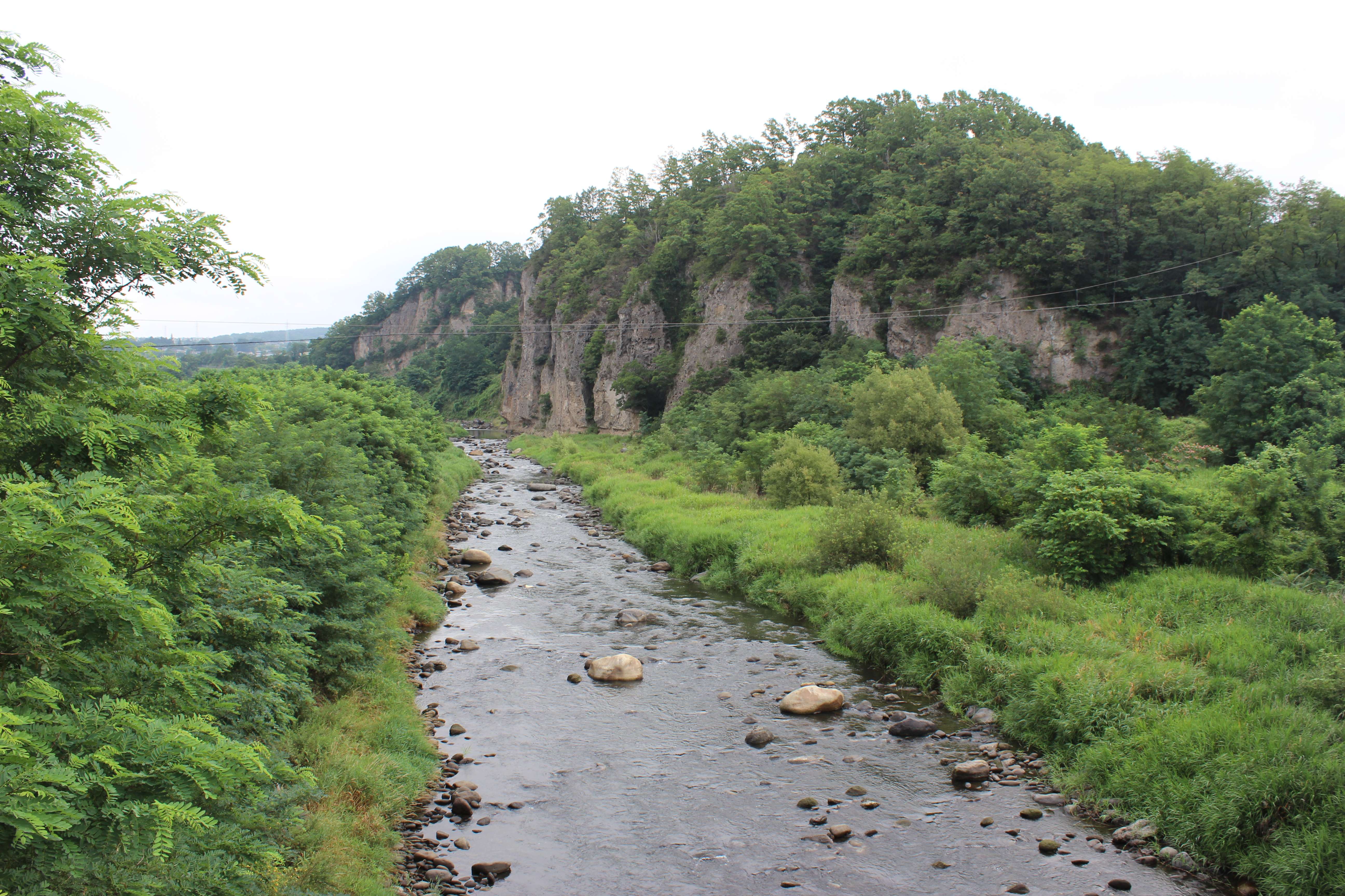 山梨県道616号鷹ノ巣橋より上流方向。